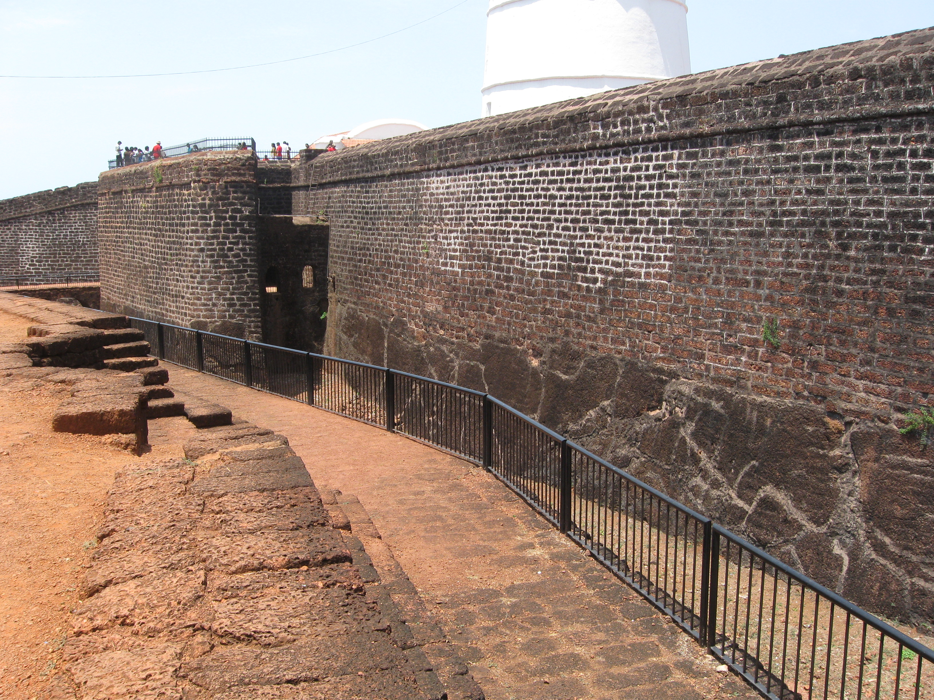 Fort Aquada, Goa, India